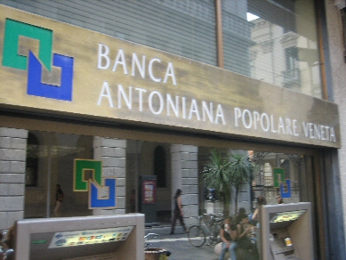 Insegna della Banca Antonveneta - Genova - Italia